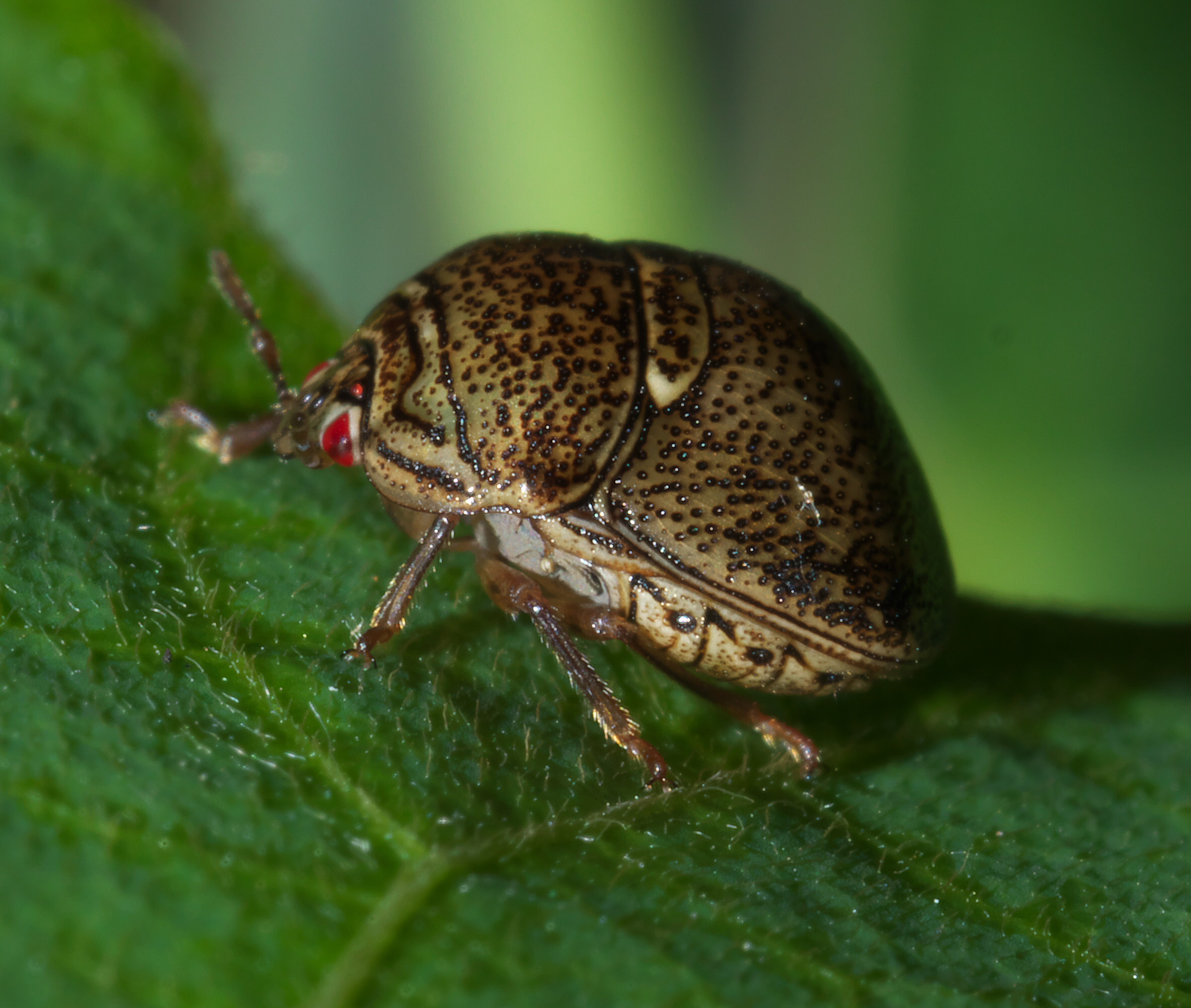 Megacopta cribraria, kudzu bug, Kudzu Bug, ID Confidence: 87